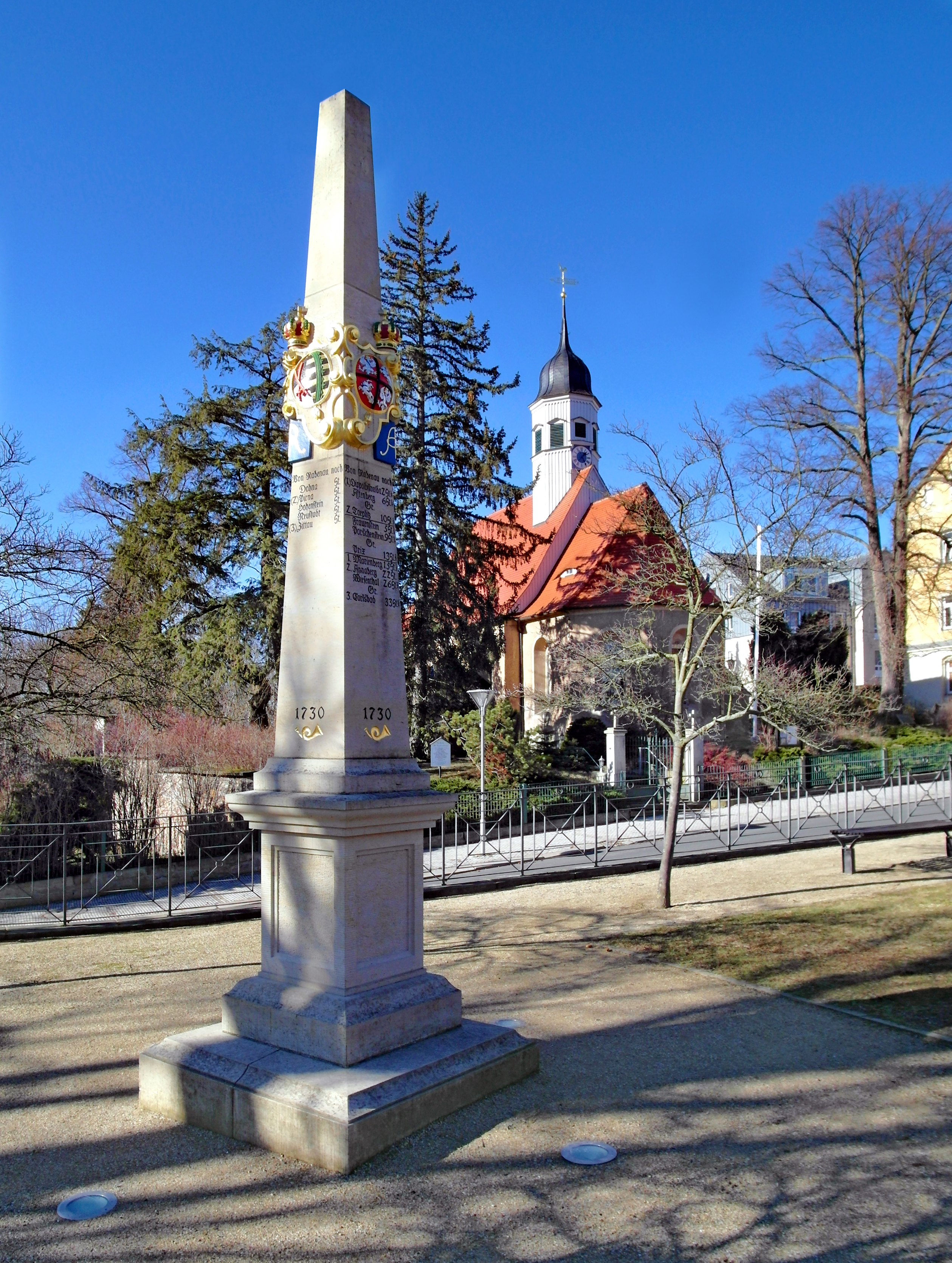 16.02.2019 01734 Rabenau, Markt: Die Kursächsische Postdistanzsäule (GMP: 50.962758,13.641540) wurde 1730 aufgestellt und 1870 wegen Baufälligkeit abgebrochen. Anlässlich des 525. Jubiläums der Stadtrechtsverleihung erfolgte am 18. Mai 2013 die Einweihung einer Nachbildung am Originalstandort, die von der Fa. Steinrestaurierung Hain aus Meißen angefertigt wurde. Im Hintergrund die evangelische St. Egidien Kirche (GMP: 50.962942,13.641054) am Markt. Einschiffiger Renaissancebau (1642). Sicht von Südosten vom Markt. [SAM9524.JPG]20199216215DR.JPG(c)Blobelt